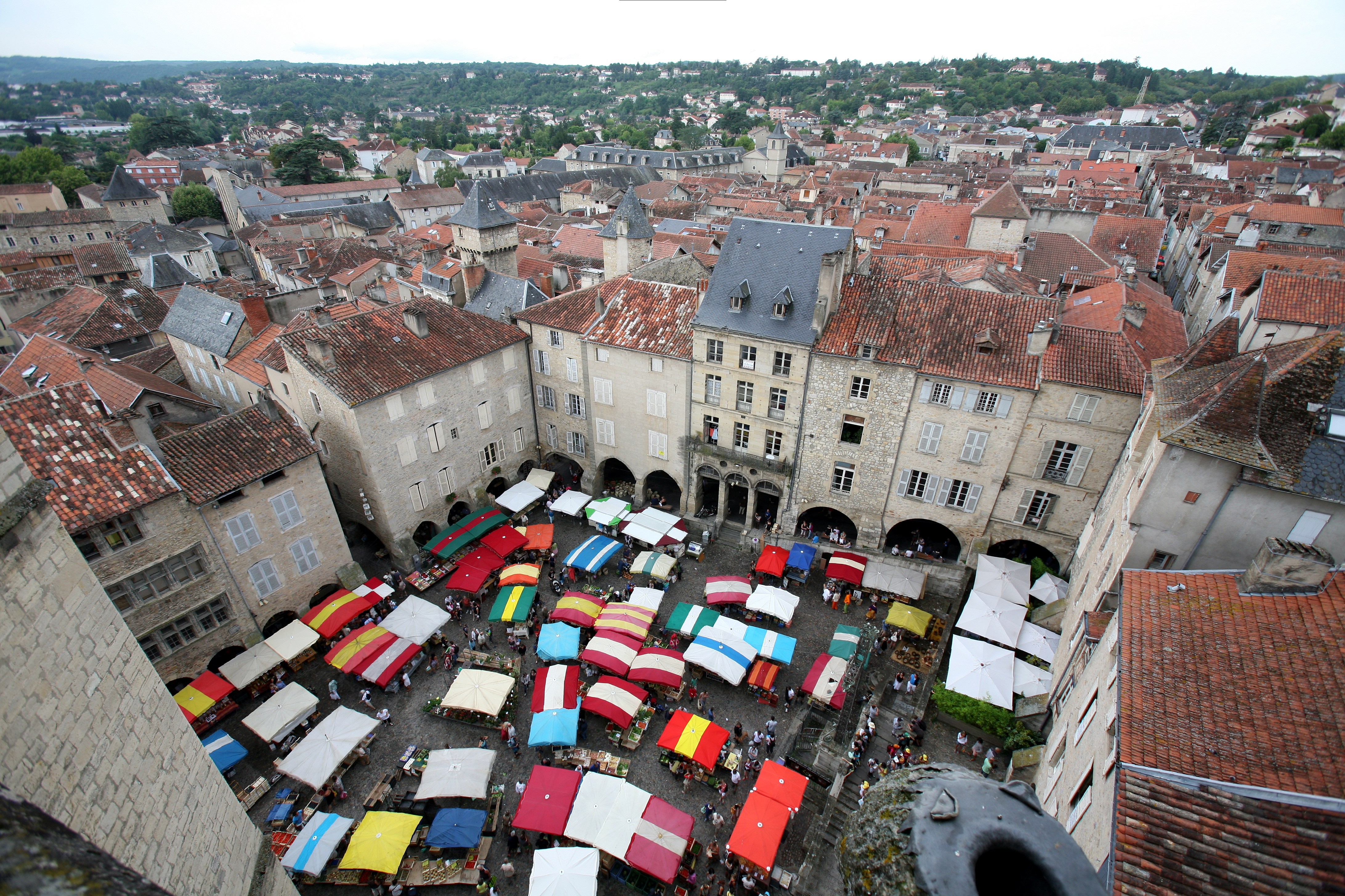 Place Notre-Dame et son marché vu du haut de la collégiale, Villefranche-de-Rouergue (Occitanie).